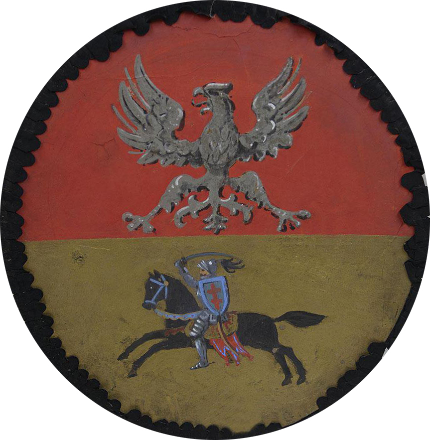 Беларуская (тарашкевіца): Беласток (Biełastok). Жалобны сьцяг з Пагоняй (Pahonia), гербам князя беластоцкага